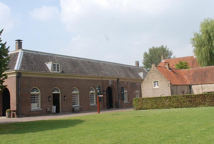 Het Nieuwe Arsenaal van Loevestein, waar wapens en munitie in werd opgeslagen.